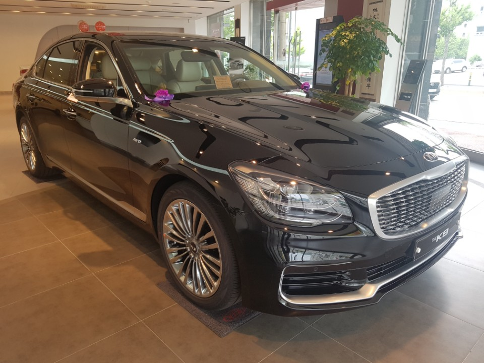 기아 더 K9 정측면